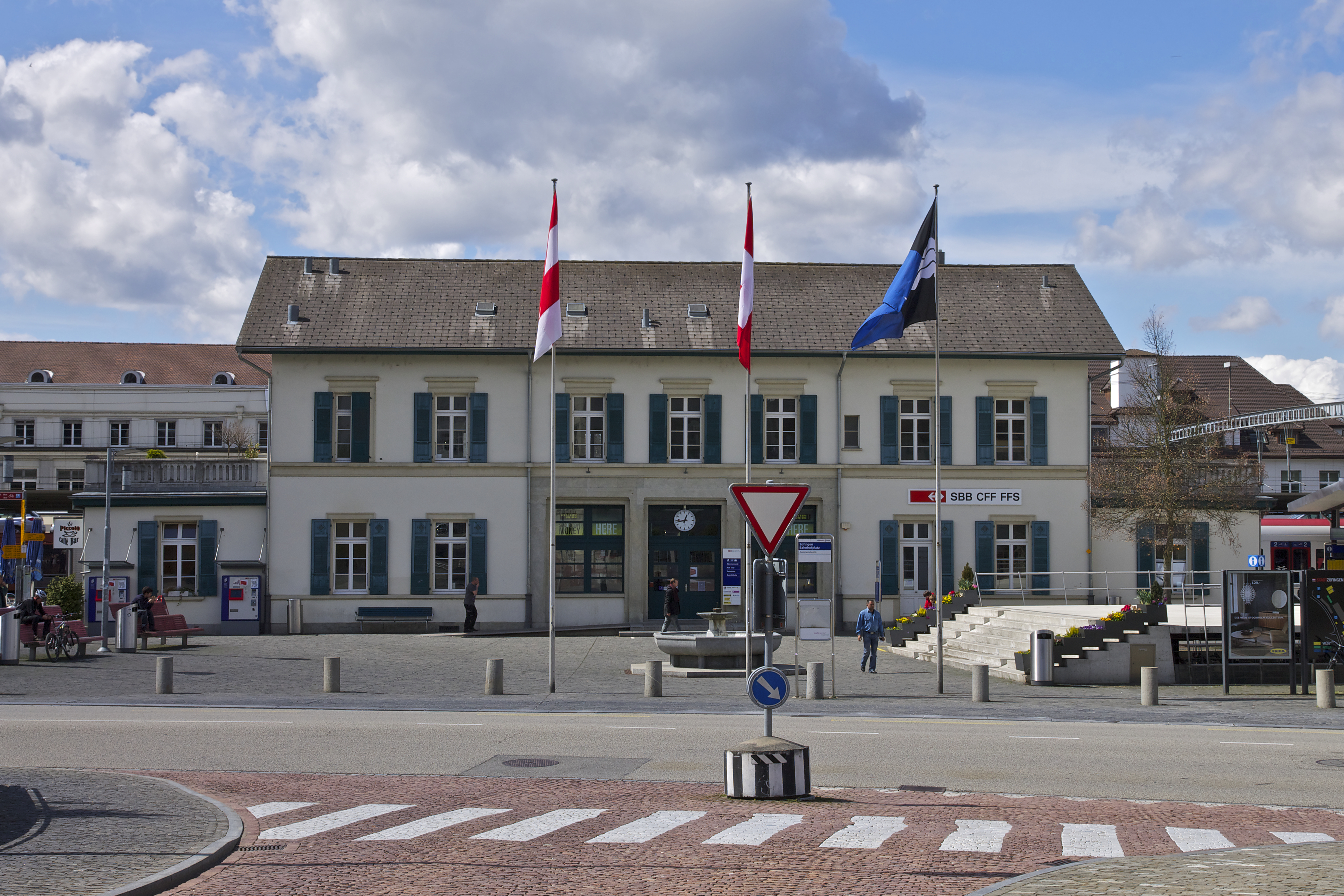 Der Bahnhof Zofingen, Ostfassade.